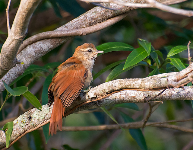 Piraju-SP - Brasil